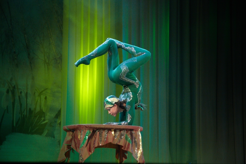 Занятия в детском цирковом отделении